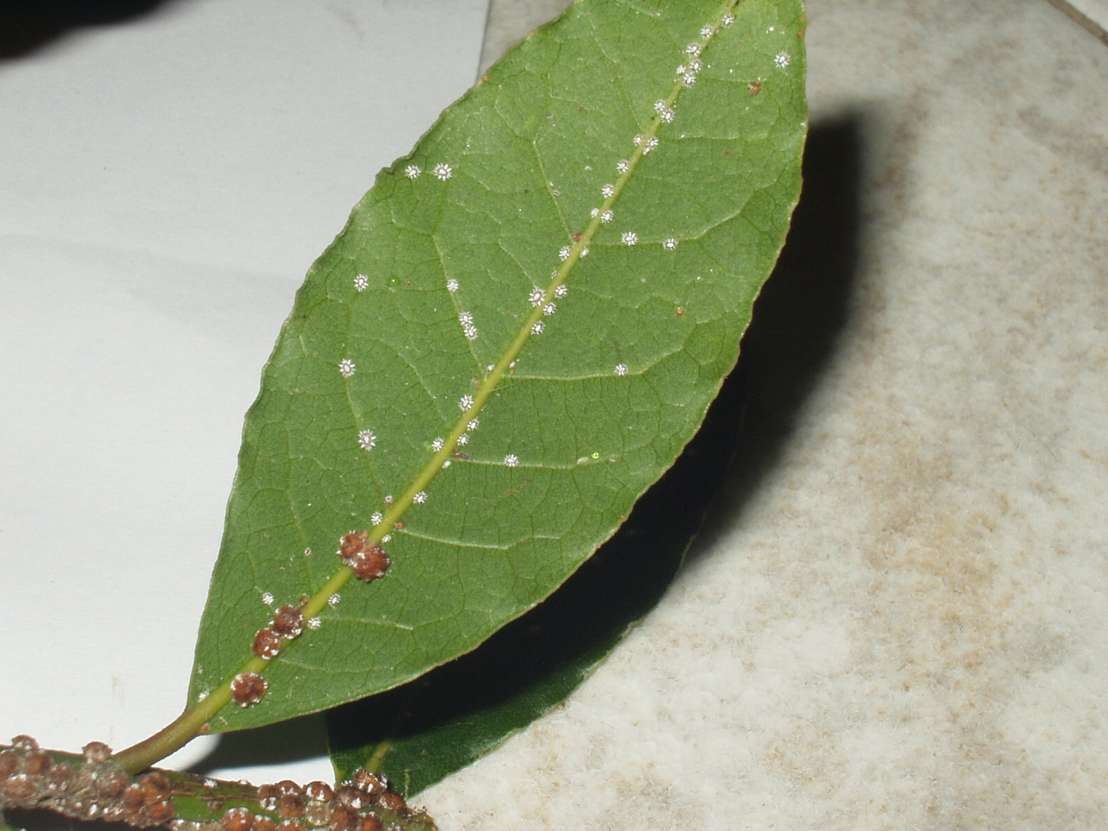 Pianta d'alloro attaccata da Coccidae